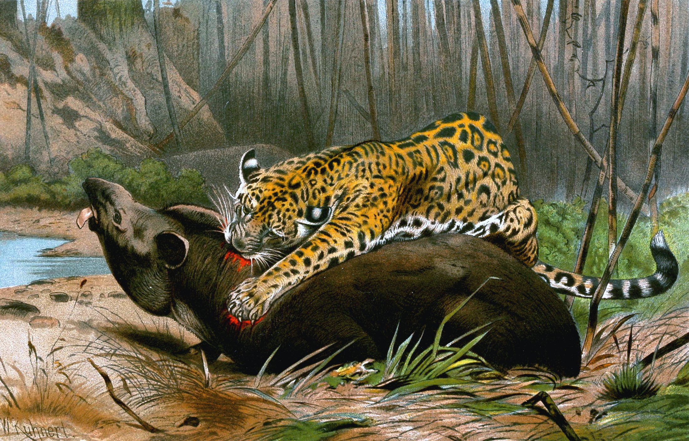 Jaguar killing tapir